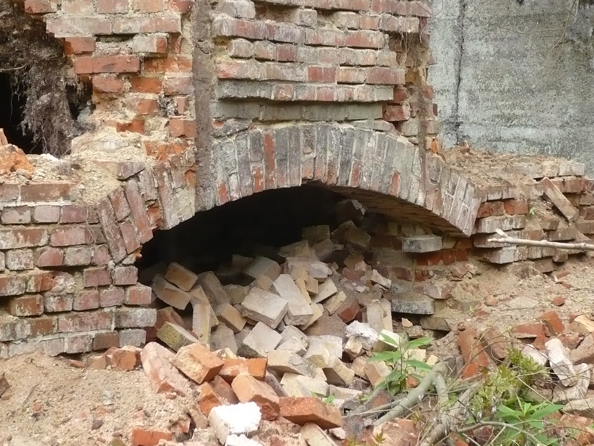 Nowa Ruda, piec do prażenia łupku